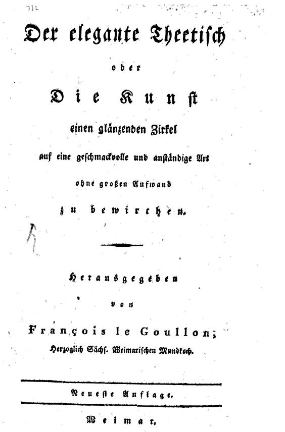 Der elegante Theetisch oder die Kunst, einen glänzenden Zirkel auf eine geschmackvolle und anständige Art ohne großen Aufwand zu bewirthen, Weimar 1809 Neujahrsgeschenk für Leckermäuler. Eine Auswahl von 100 der schönsten Mehl-, Milch- und Eier-Speisen der Engländer, Franzosen und Italiener, als Poudings, Aufläufe, Omletten, Dampfnudeln, Klöse, Macaroni, usw., hg. François Le Goullon, Weimar 1813